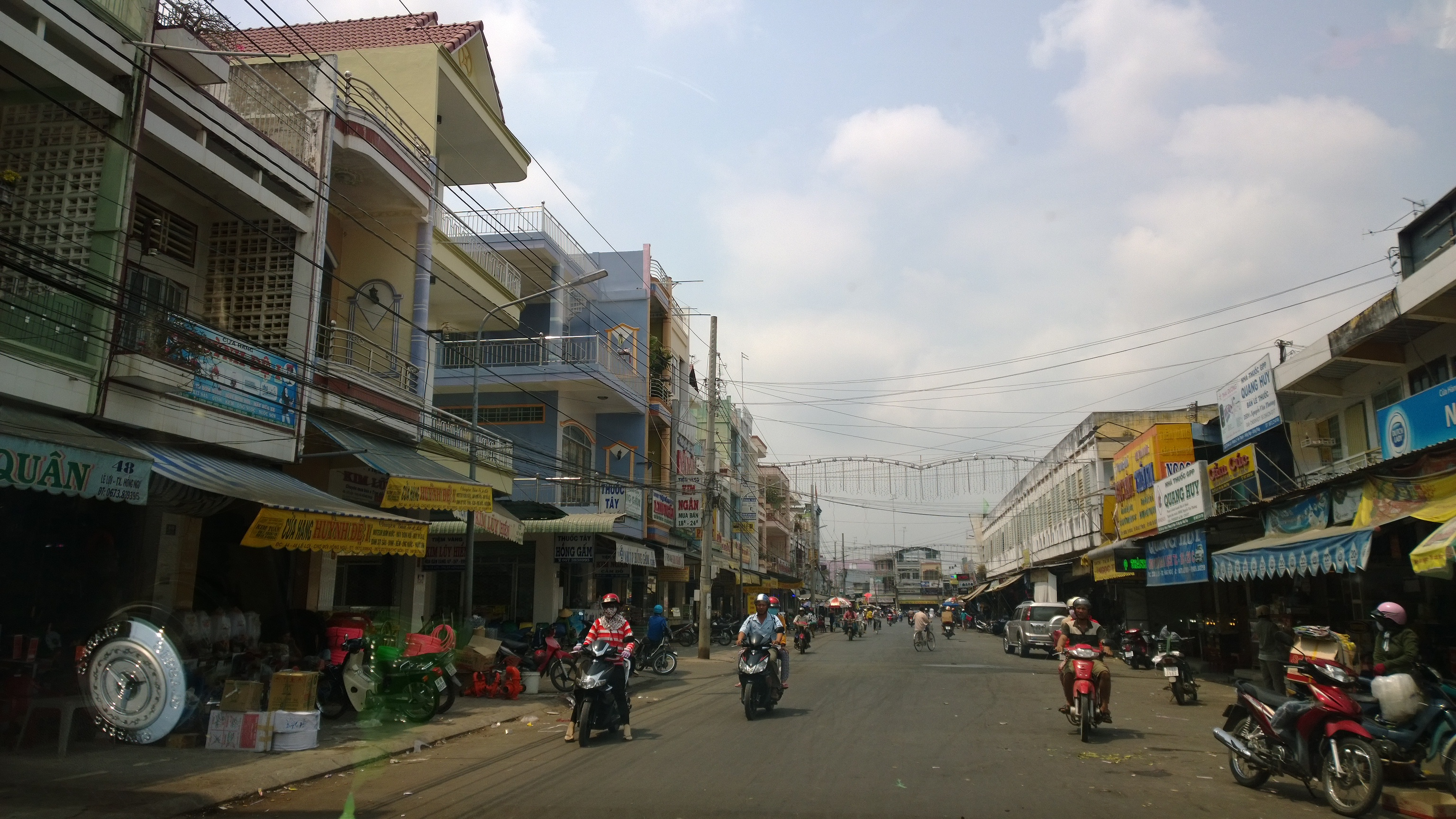 Duong Le loi, khom 4, tx Hong ngu, dong thap, vietnam